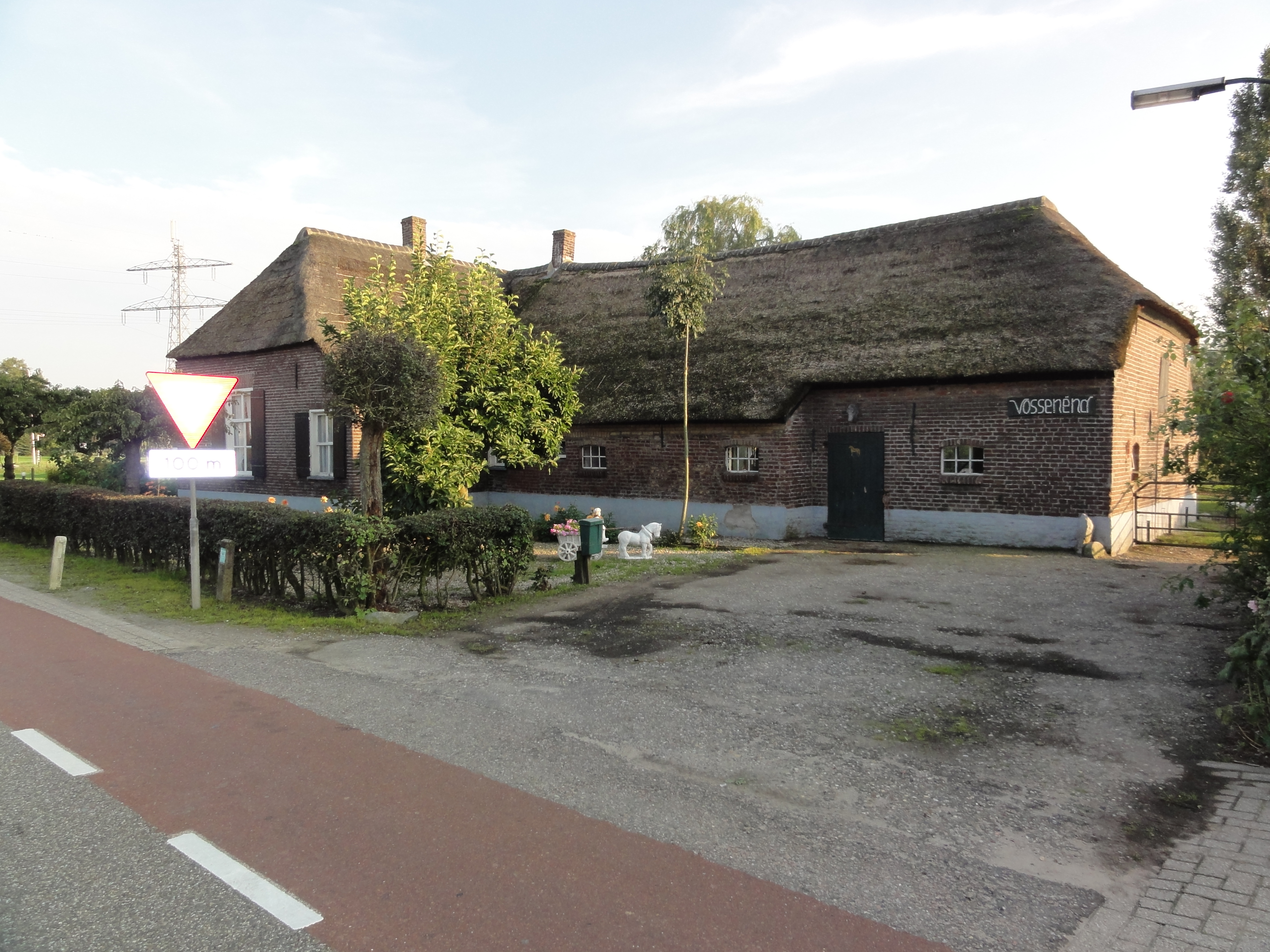 Heumen Rijksmonument 523932 Vosseneindseweg 5 huis